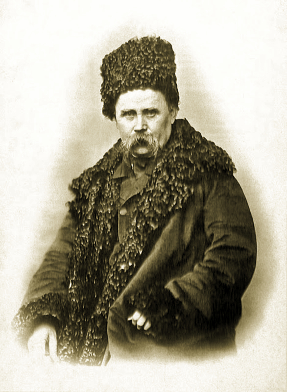 Фото, Т. Шевченка — в смушковій шапці й кожусі, з поголеною бородою — зроблено в квітні 1858 у А. Деньєра. З цього фото Л. Жемчужніков замовив у Парижі літографський портрет (його неперевершено виконав літограф А. Муйєрон) і доставив до Петербурга. Шевченко підтвердив літографію підписом і використовував її, працюючи над останнім автопортретом. Після смерті кобзаря художники В. Мате, М. Мурашко, Ф. Красицький та ін. користувалися цим знімком для створення живописних, графічних і скульптурних портретів Шевченка. З цього ж фото І. Крамськой на замовлення П. Третьякова зобразив один з найкращих портретів Тараса Шевченка.